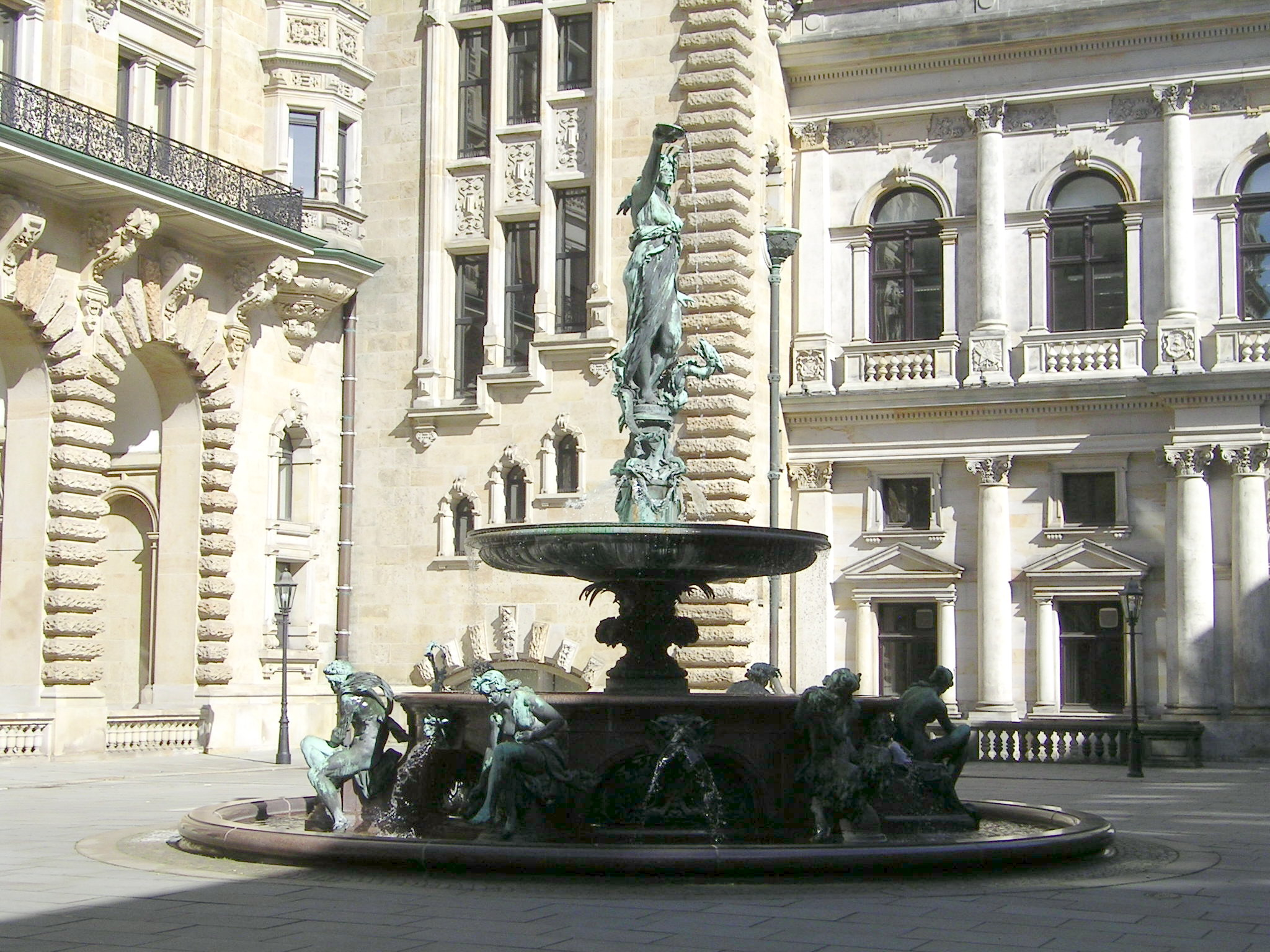 Hamburg Rathaus User:Tarawneh/rami